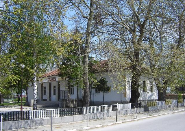 Читалище „Иван Царев“ в село Триводици